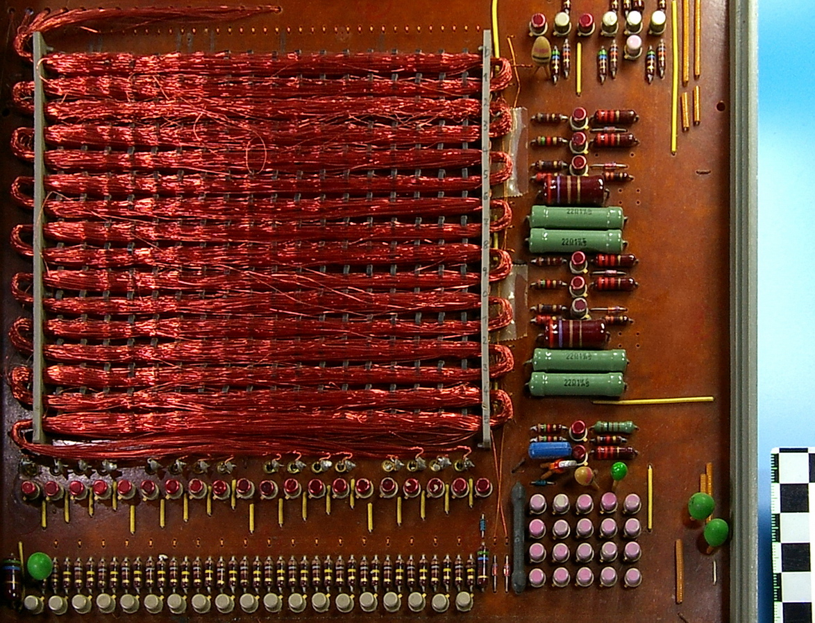 Kernspeicher in Fädeltechnik, vermutlich aus einem Nixdorf System 820, Speicherkapazität max. 4096 handverdratete Befehlsworte zu 18 Bit Anmerkungen=Bild digital nachbearbeitet. Original auf Anfrage.